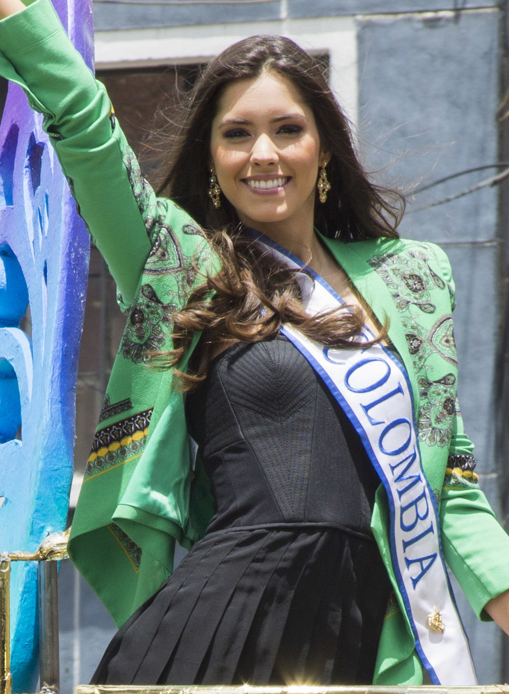 XXXVI versión de la Caminata de la Solidaridad por Colombia